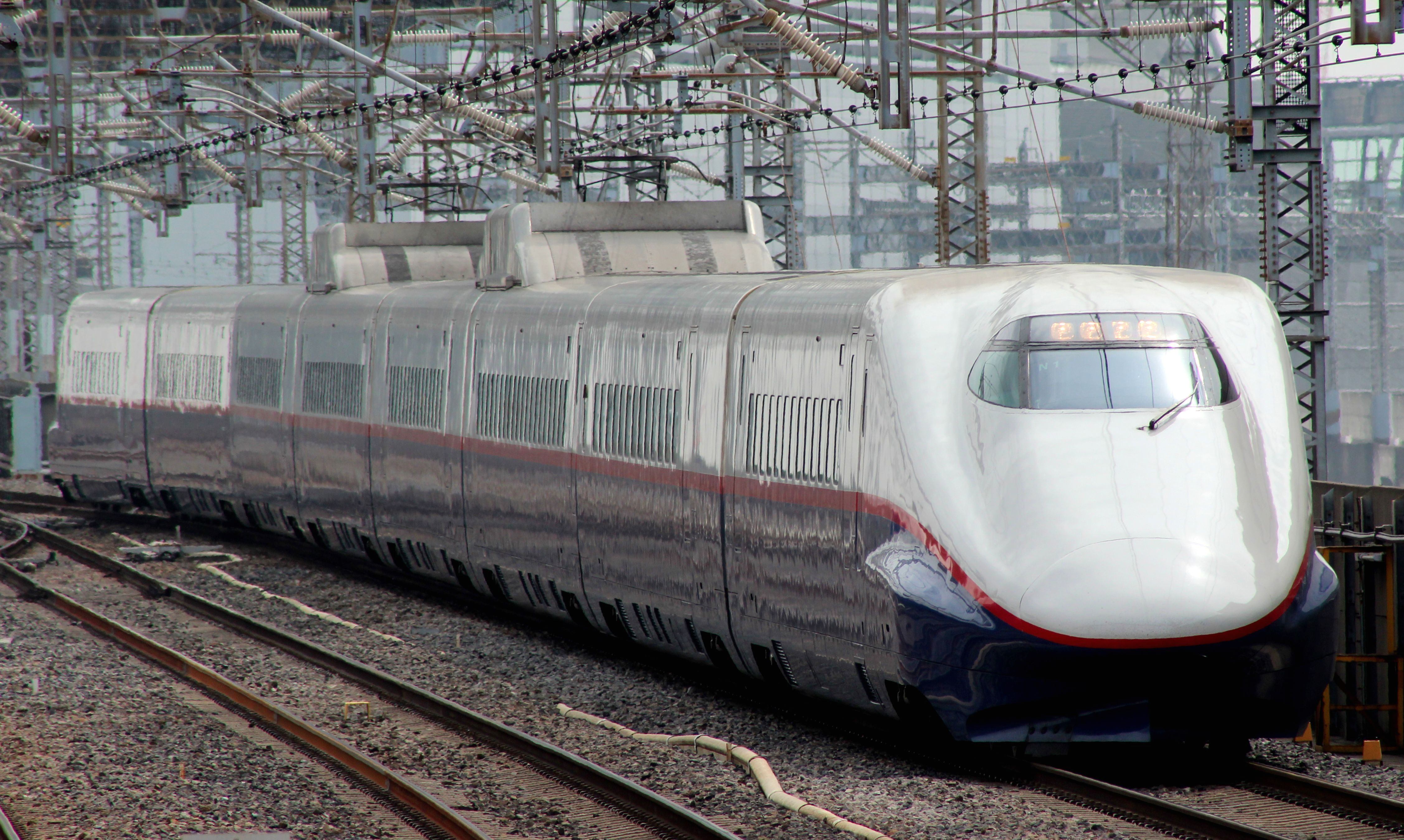 新幹線E2系（長野新幹線用）